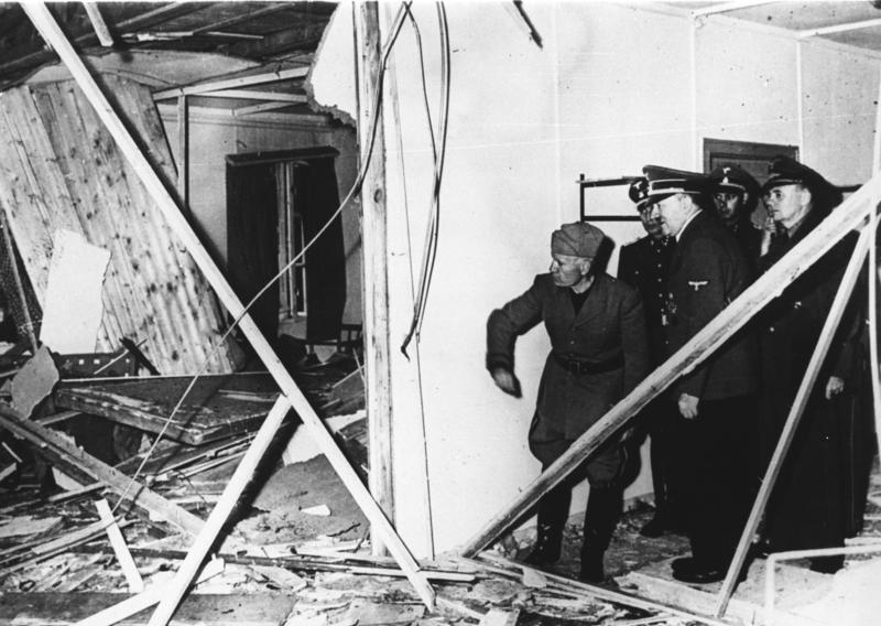 Besuch Mussolinis bei Hitler im Führerhauptquartier Wolfsschanze bei Rastenburg (Ostpreußen) unmittelbar nach dem Attentatsversuch vom 20. Juli 1944. Besichtigung der zerstörten Baracke (ganz rechts. Dolm. Dr. Paul Schmidt)